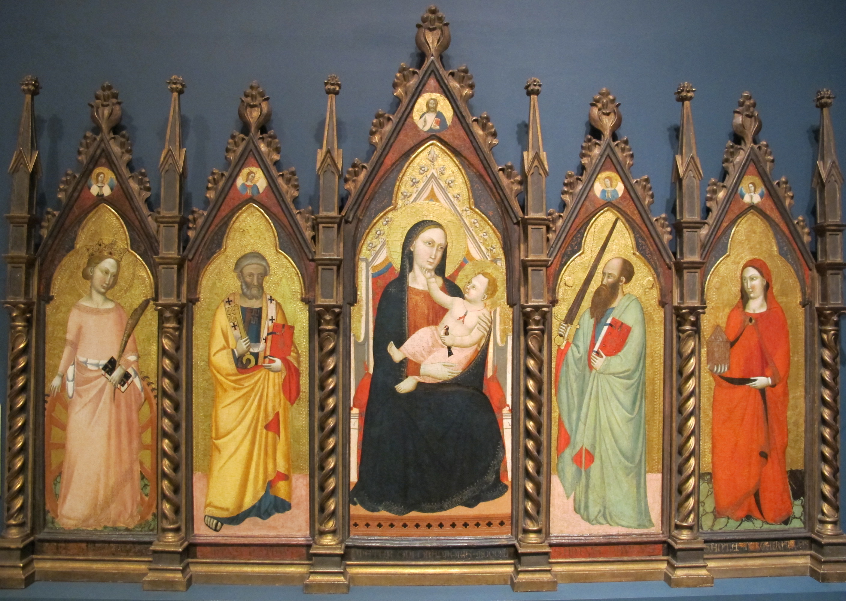 Maestro delle effigi domenicane, madonna col bambino in trono e santi, 1345 ca.